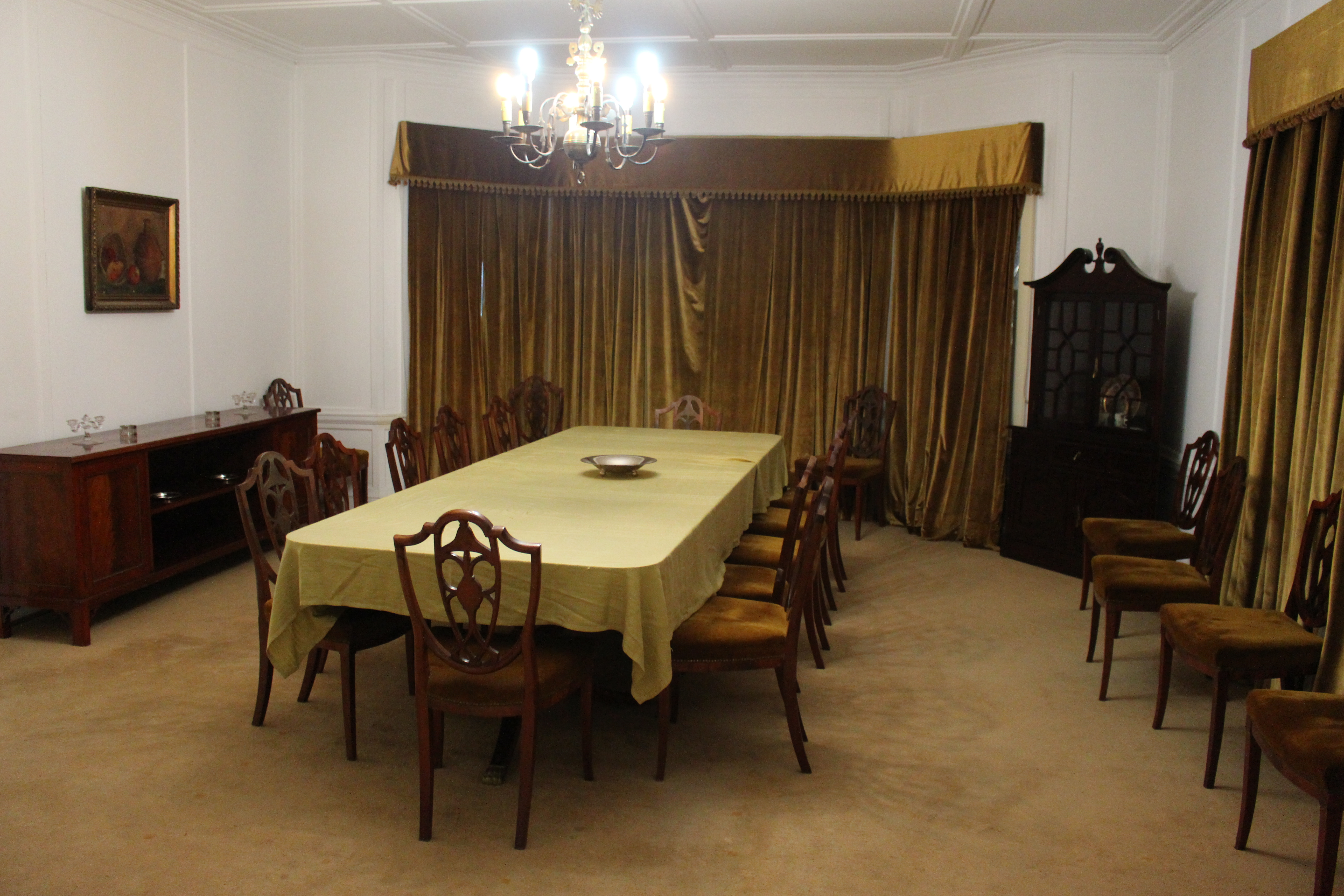 Comedor Casa 100 en Coya comuna Machalí Chile